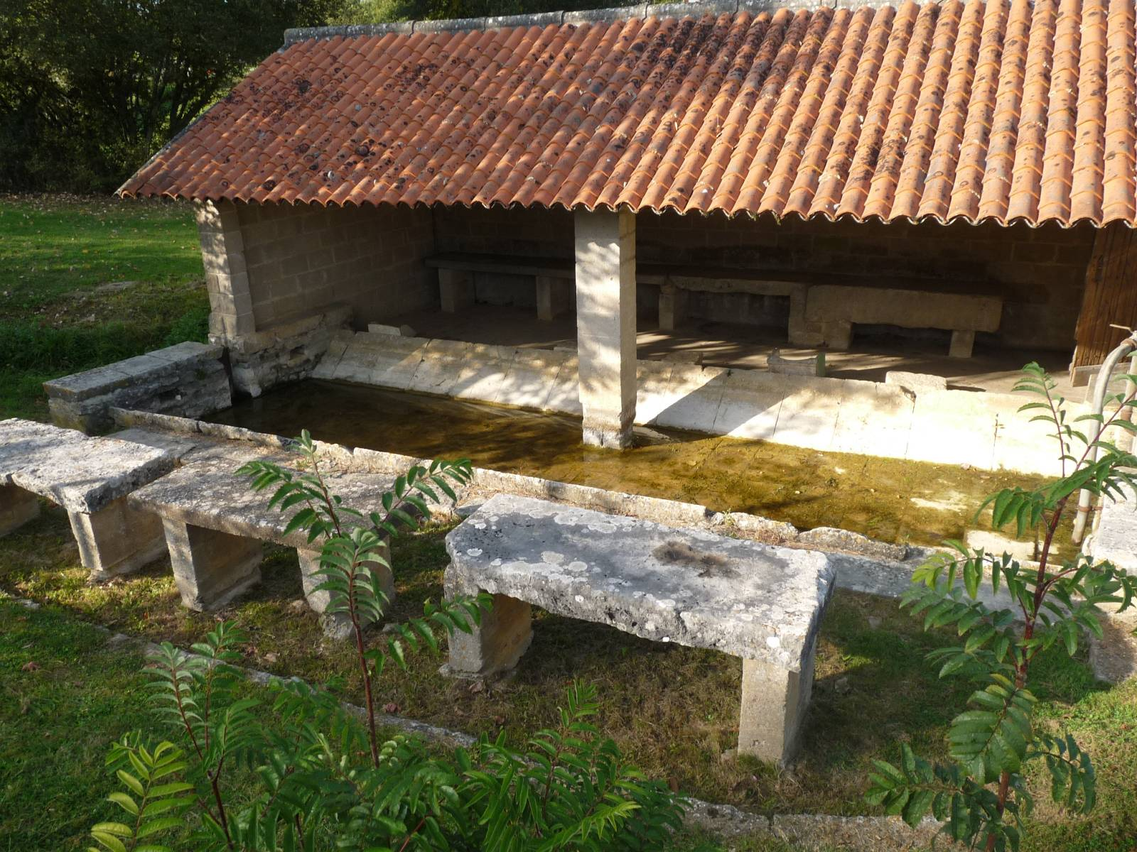 Lavoir sur la Tiarde, St-Gourson, Charente, France